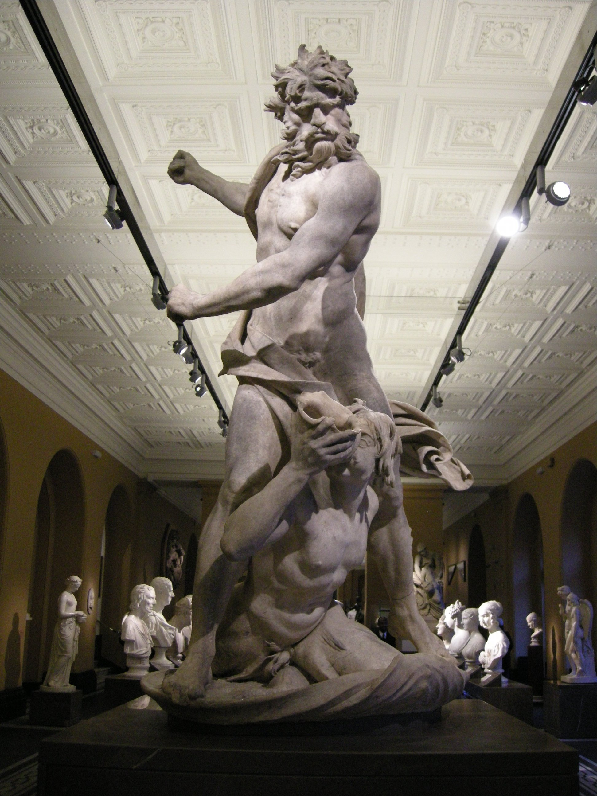 Gianlorenzo bernini, nettuno e il tritone, 1622-23 ca.